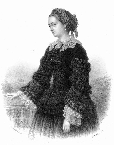 Belgian opera singer Marie Cabel (1827-1885) by Charles Vogt (181?-189?)